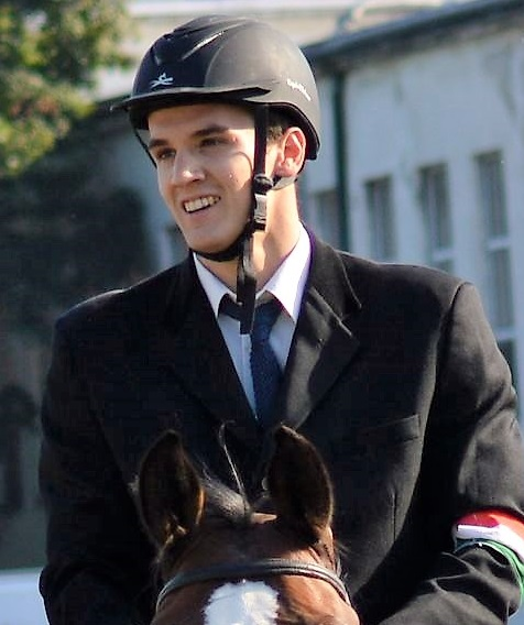 Demeter Bence öttusázó